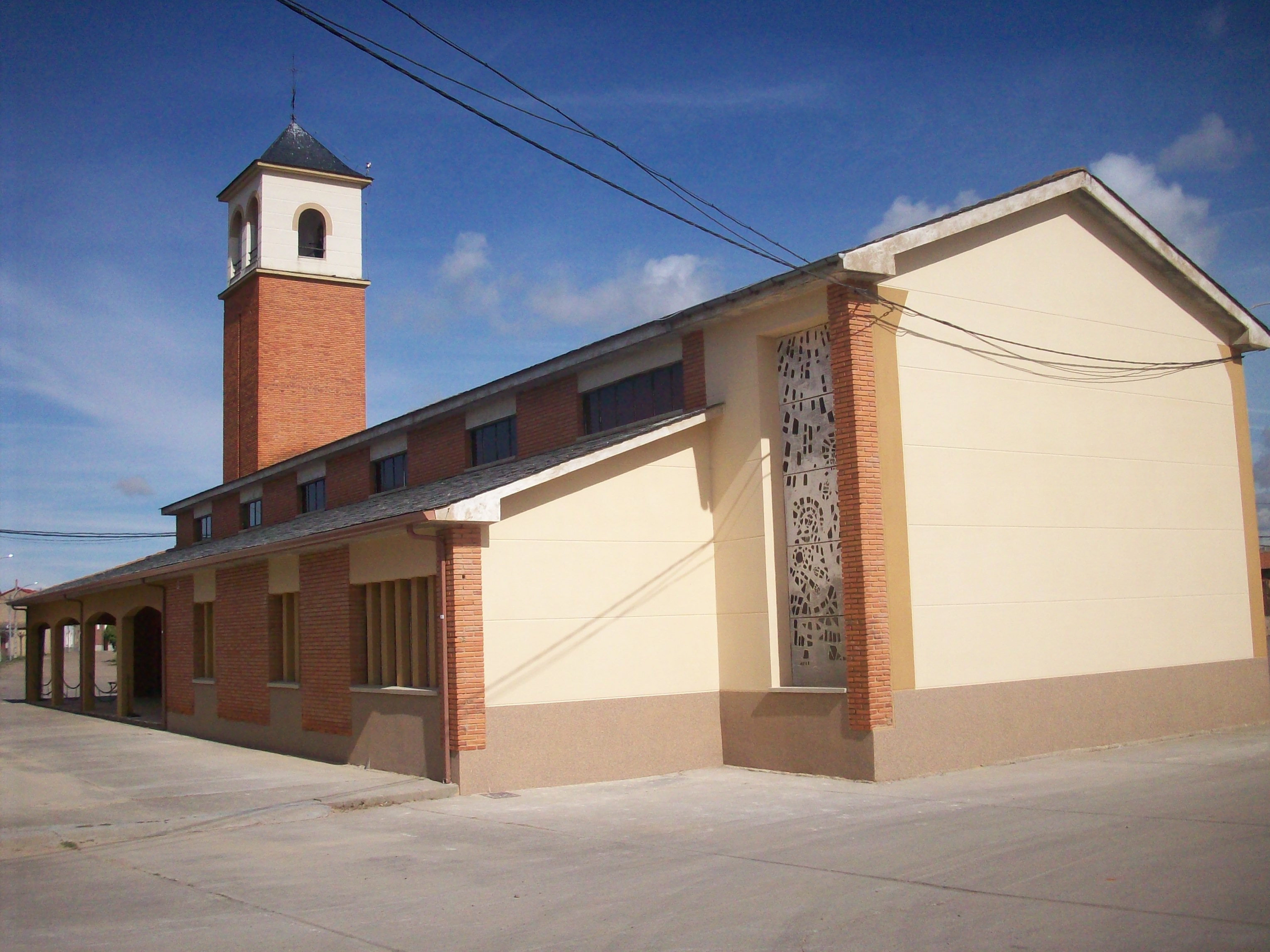 Iglesia parroquial de Santa María de Turcia, construida en el año 1967.